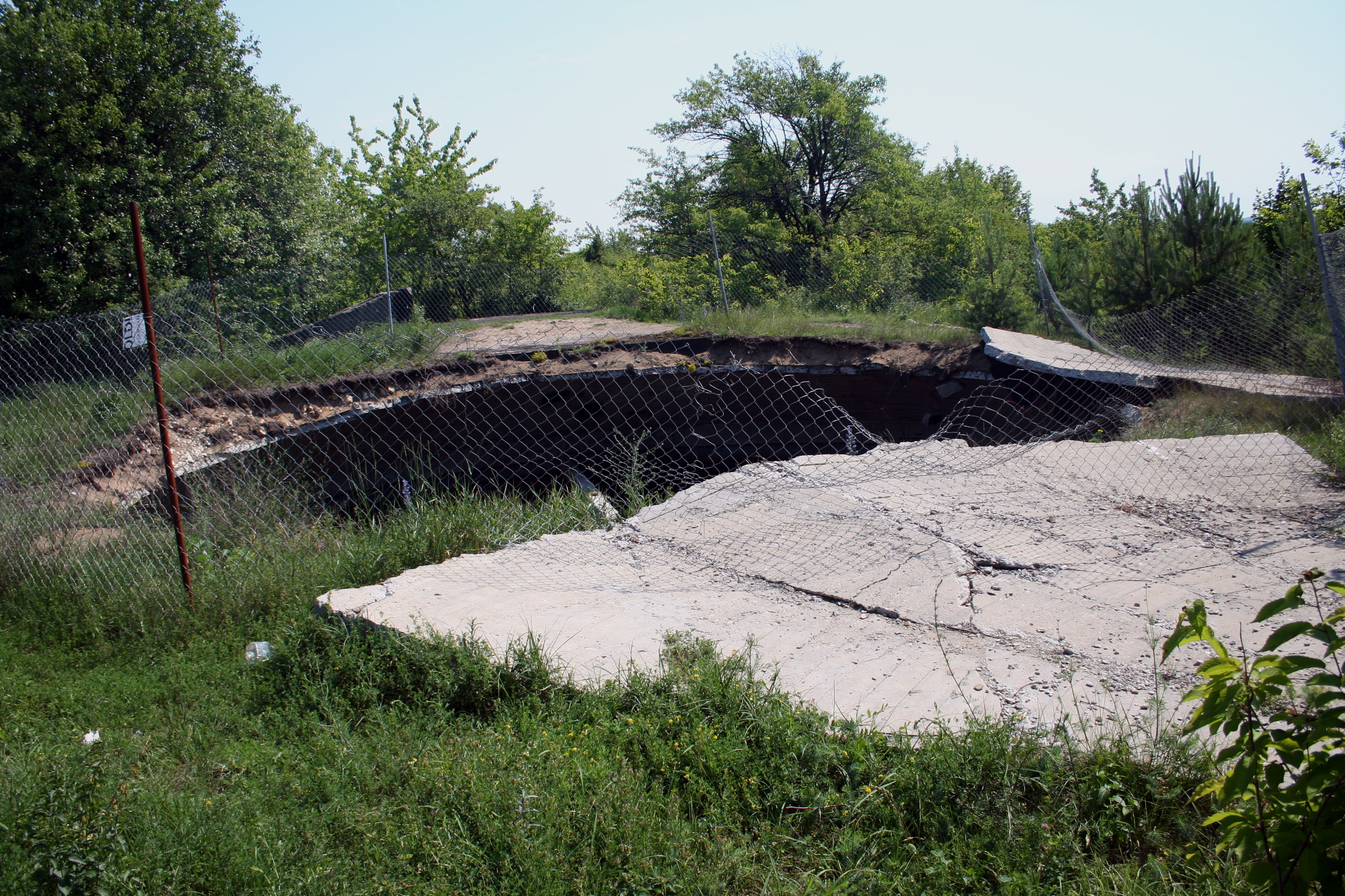 Ruina obiektu na szczycie Góry Ossona w Częstochowie